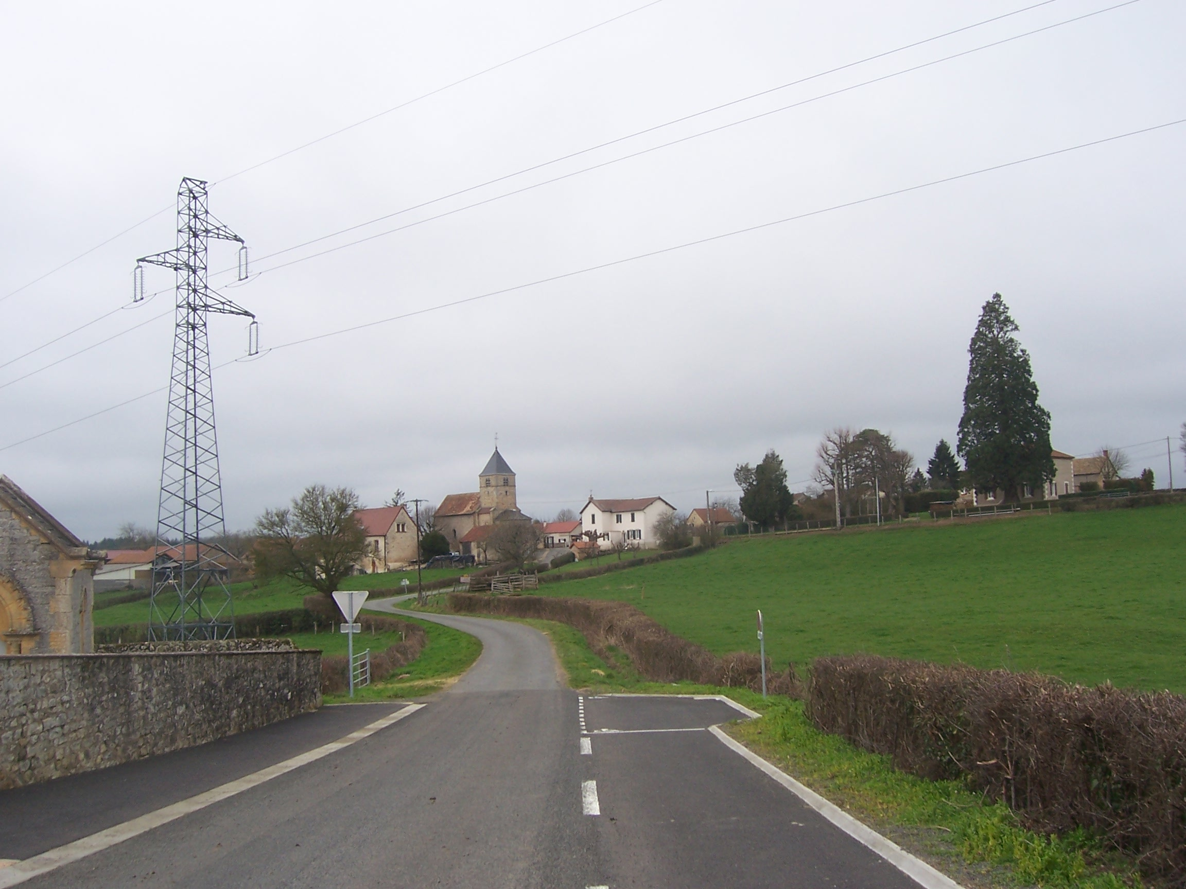 Saint-Romain-sous-Versigny